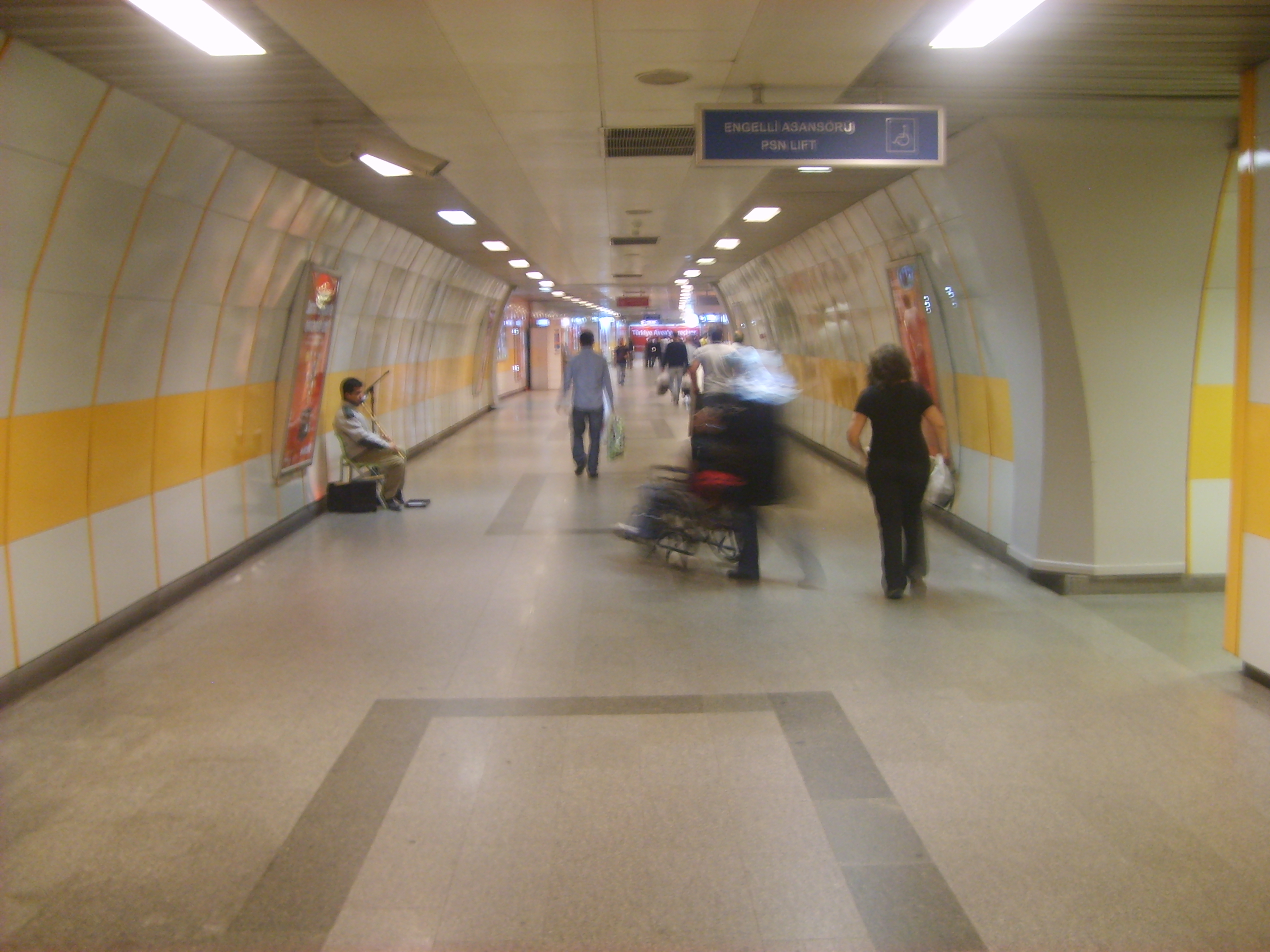 Istanbul metrosu, Osmanbey istasyonu